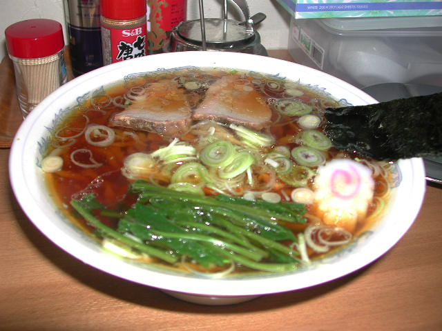 Shirakawa Ramen.